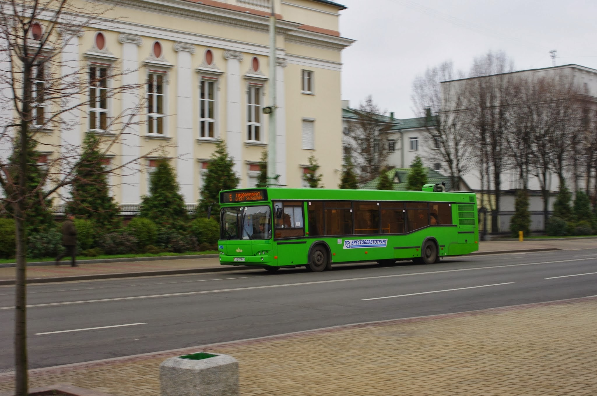 Lieninski rajon, Brest, Belarus